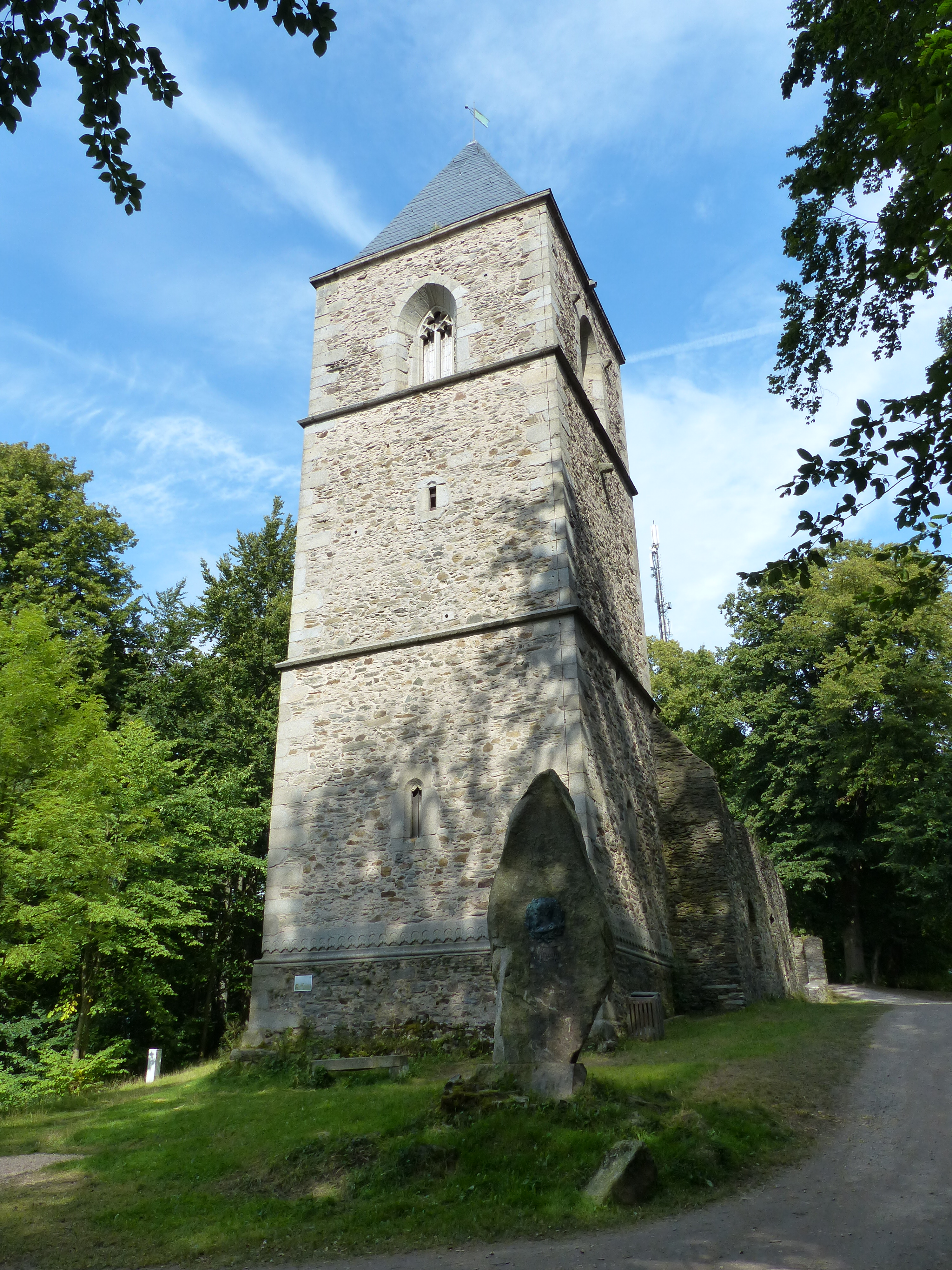 Ansicht der Katharinenkirche